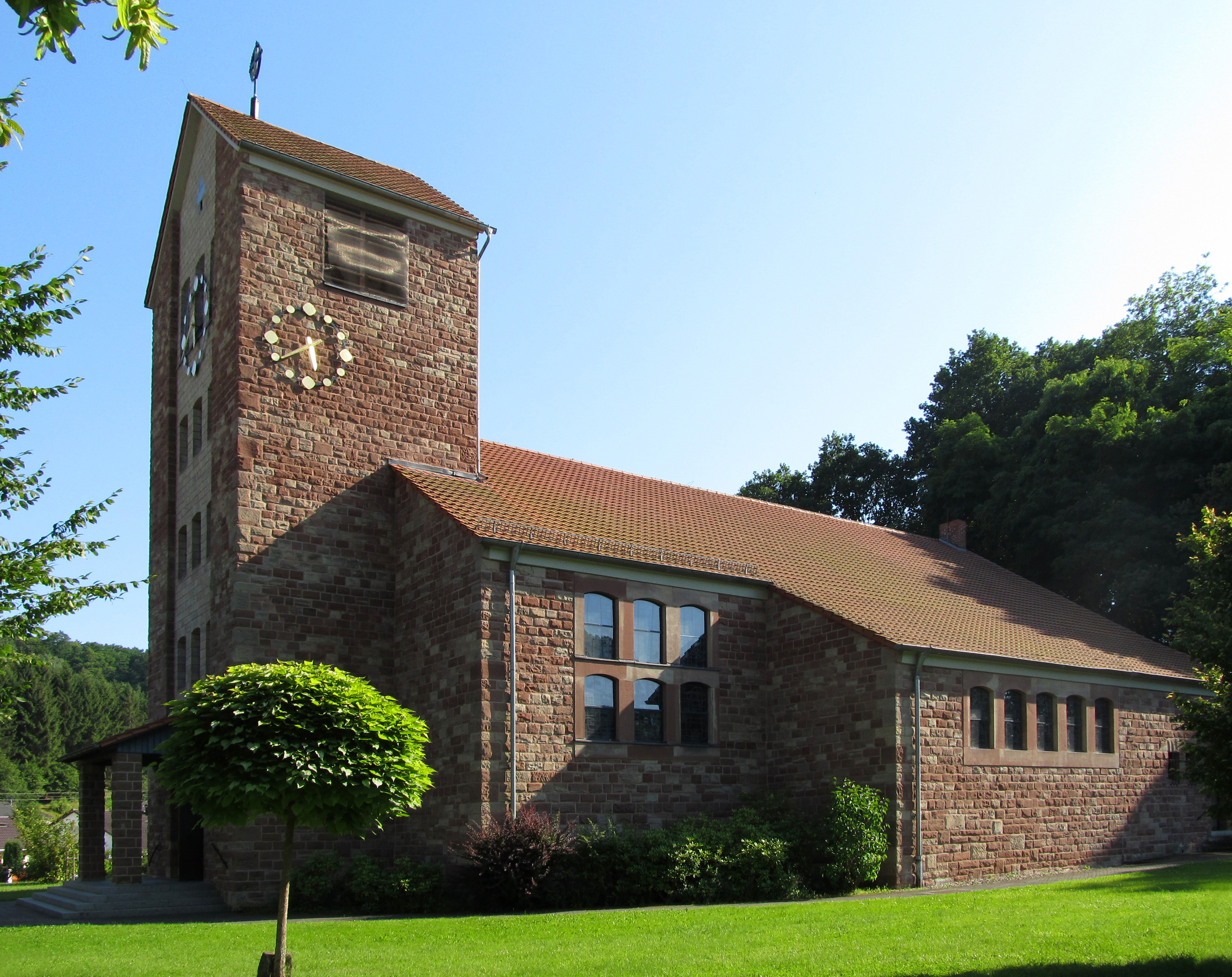 Die katholische Marienkirche in Alschbach, einem Stadtteil von Blieskastel, Saarland